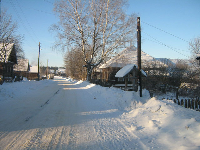 Большие Талицы в морозную зиму. Некоторым домам более 100 лет